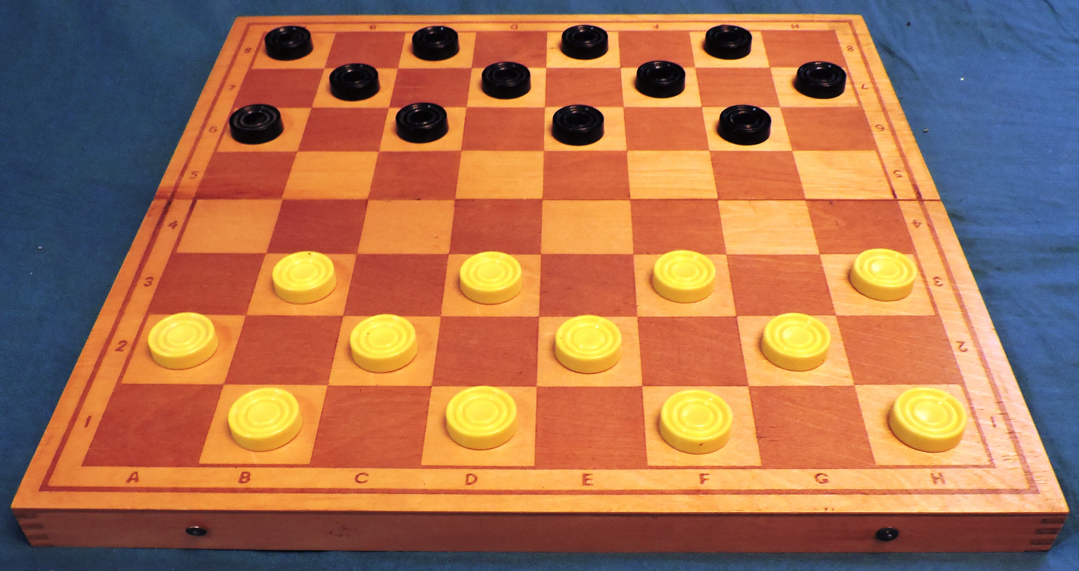 В ямайском варианте пул чекерса игра ведётся по белым клеткам доски